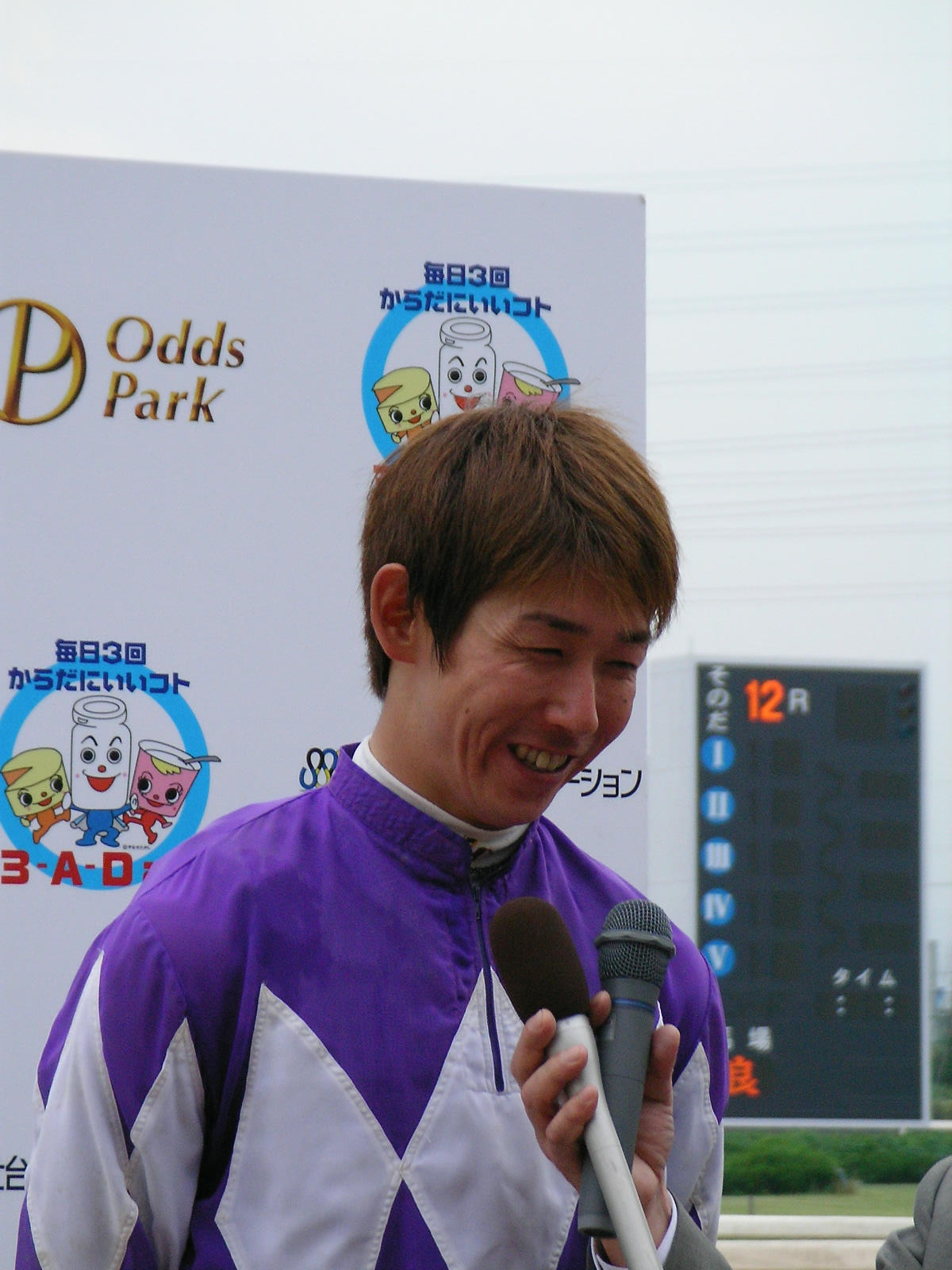 兵庫ダービーを制しインタビューに答える下原理 撮影日: 2006年6月8日 撮影場所: 園田競馬場 撮影者: りえたん